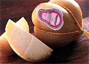 Queso provolone hilado con forma de pera